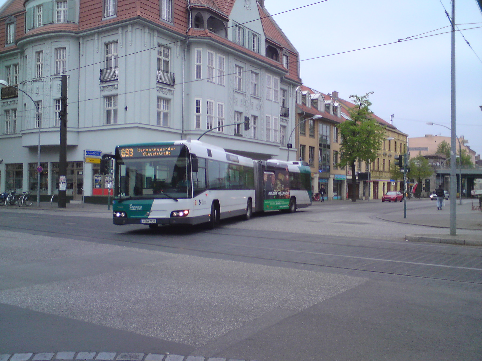 Ein Volvo Gelenkbus biegt am 18. April 2009 am Rathaus Babelsberg in die Rudolf-Breitscheid-Straße ein. Die Fahrzeuge gehören zu den neuesten Vertretern in der Flotte des Verkehrsbetriebs in Potsdam und kommen auf den Linien mit den höhsten Fahrgastaufkommen zum Einsatz. Hierzu gehört zweifelsohne auch die Linie 693, die nahezu alle Stadtviertel östlich der Havel berührt und wahrscheinlich die längste Stadtlinie im Netz darstellt. Im Vordergrund ist die Straßenbahn zur Fontanestraße erkennbar, im Hintergrund die Brücke der S- und Regionalbahn am S-Bahnhof Babelsberg.